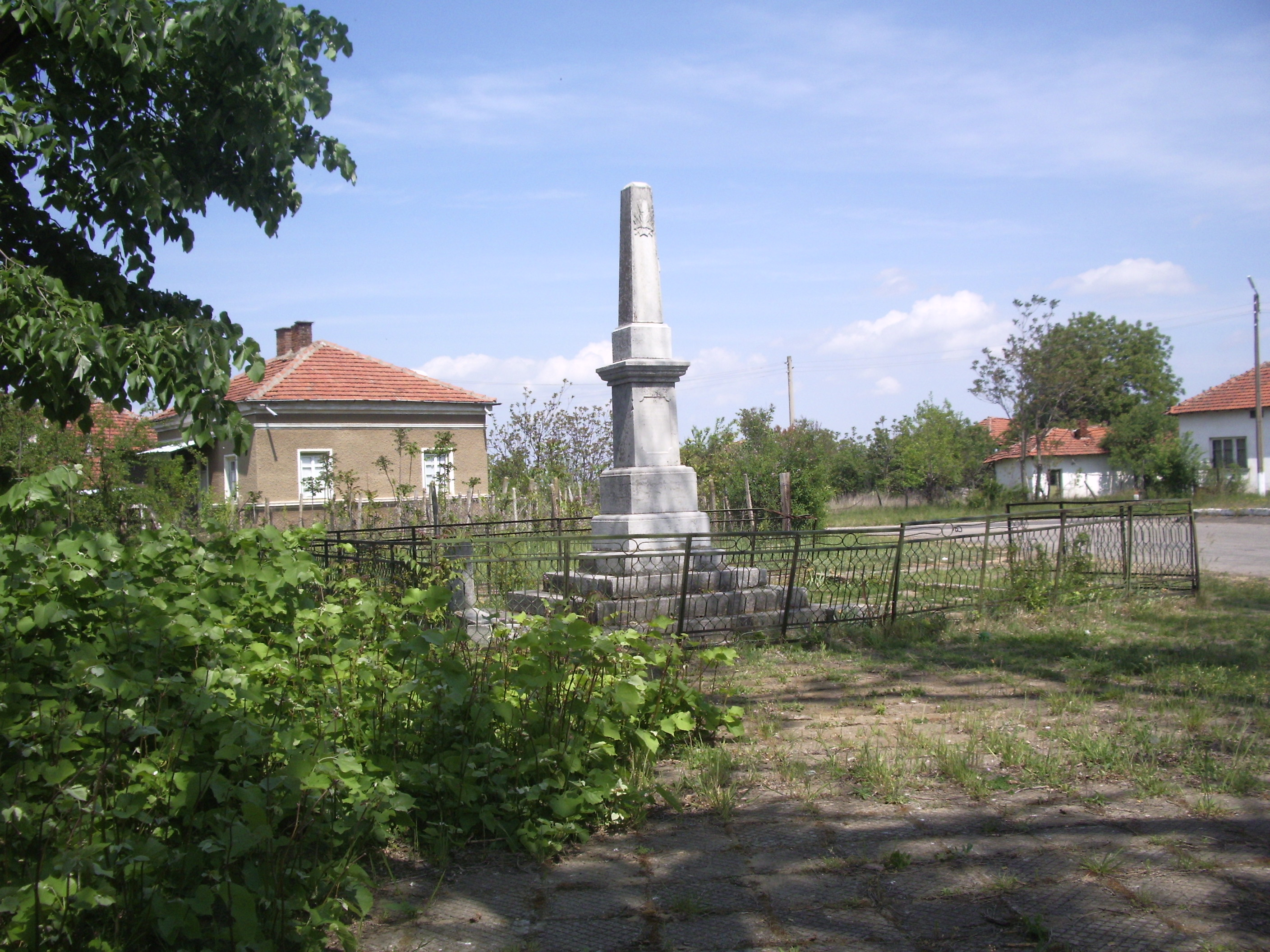 Паметника в центъра на село Дъбова махала